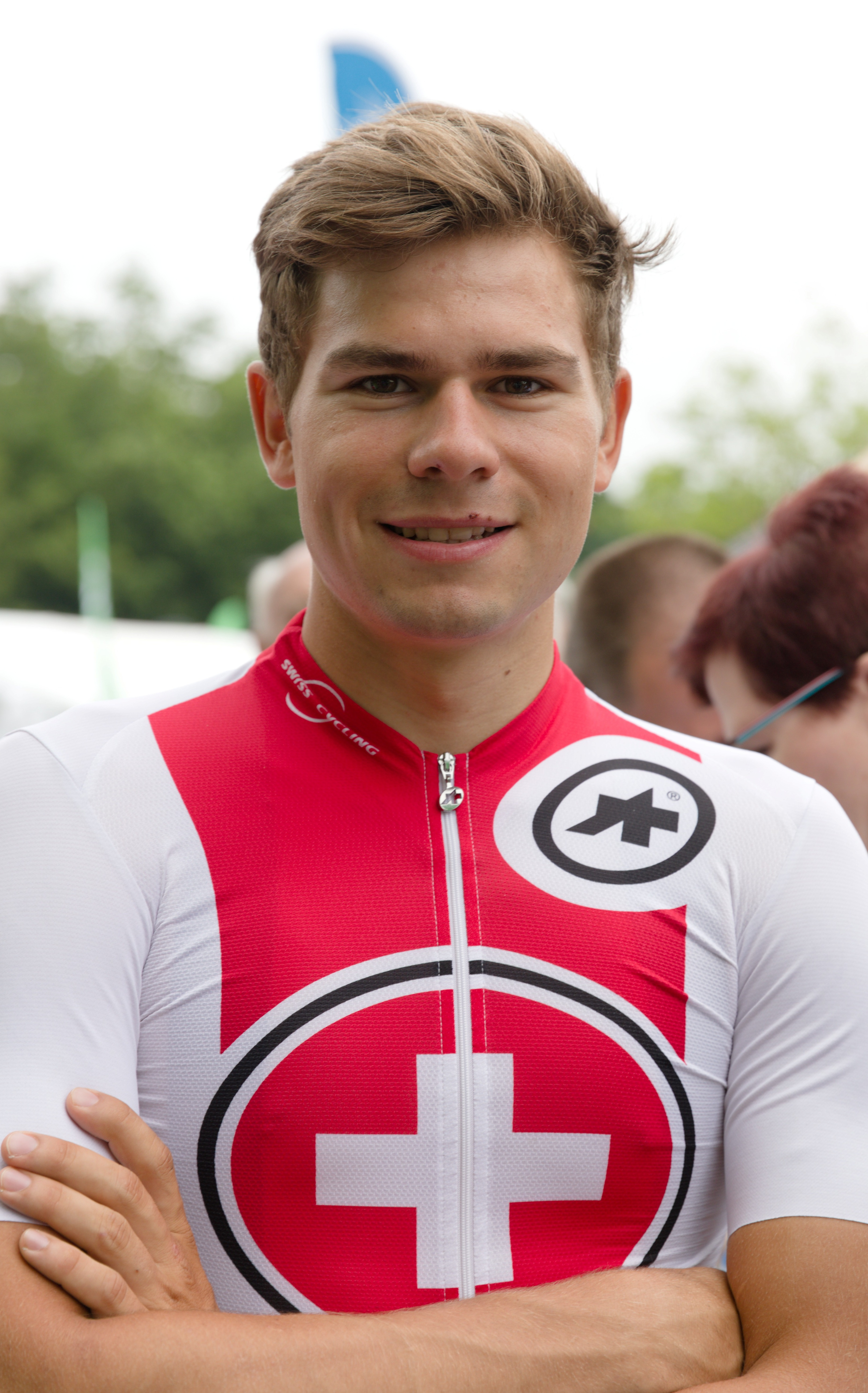 Stefan Bissinger, Schweizer Radsportler